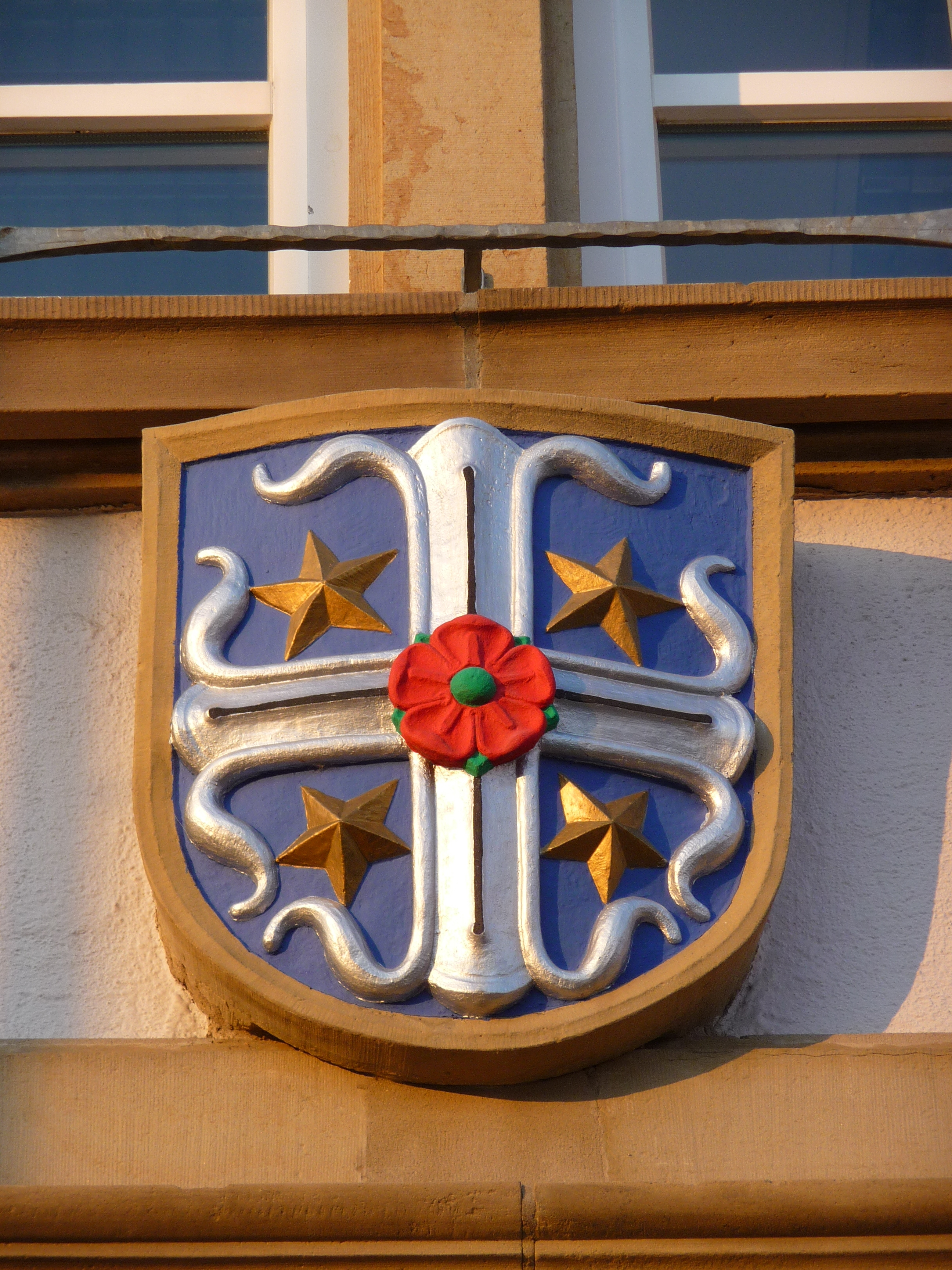 Plankstadt - Wappen am Rathaus